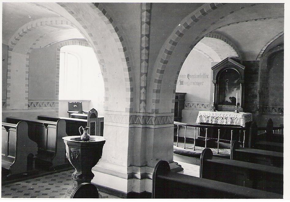 Rosenholm Slotskapel, indrettet 1604